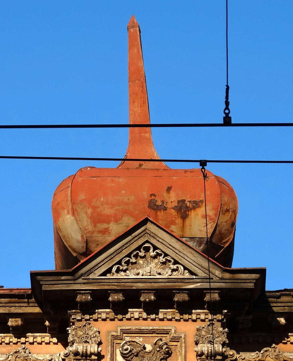 Kamienica przy ul. Dworcowej 77 w Bydgoszczy